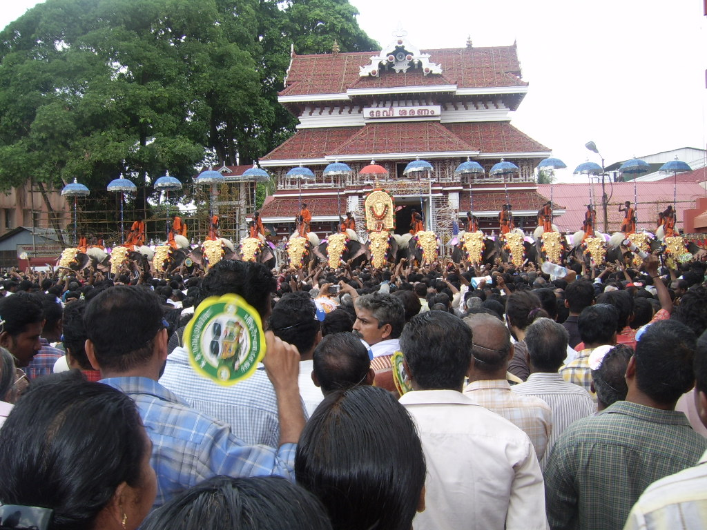 പാറമേക്കാവ് ഭഗവതി എഴുന്നള്ളിപ്പ് പൂരം 2007